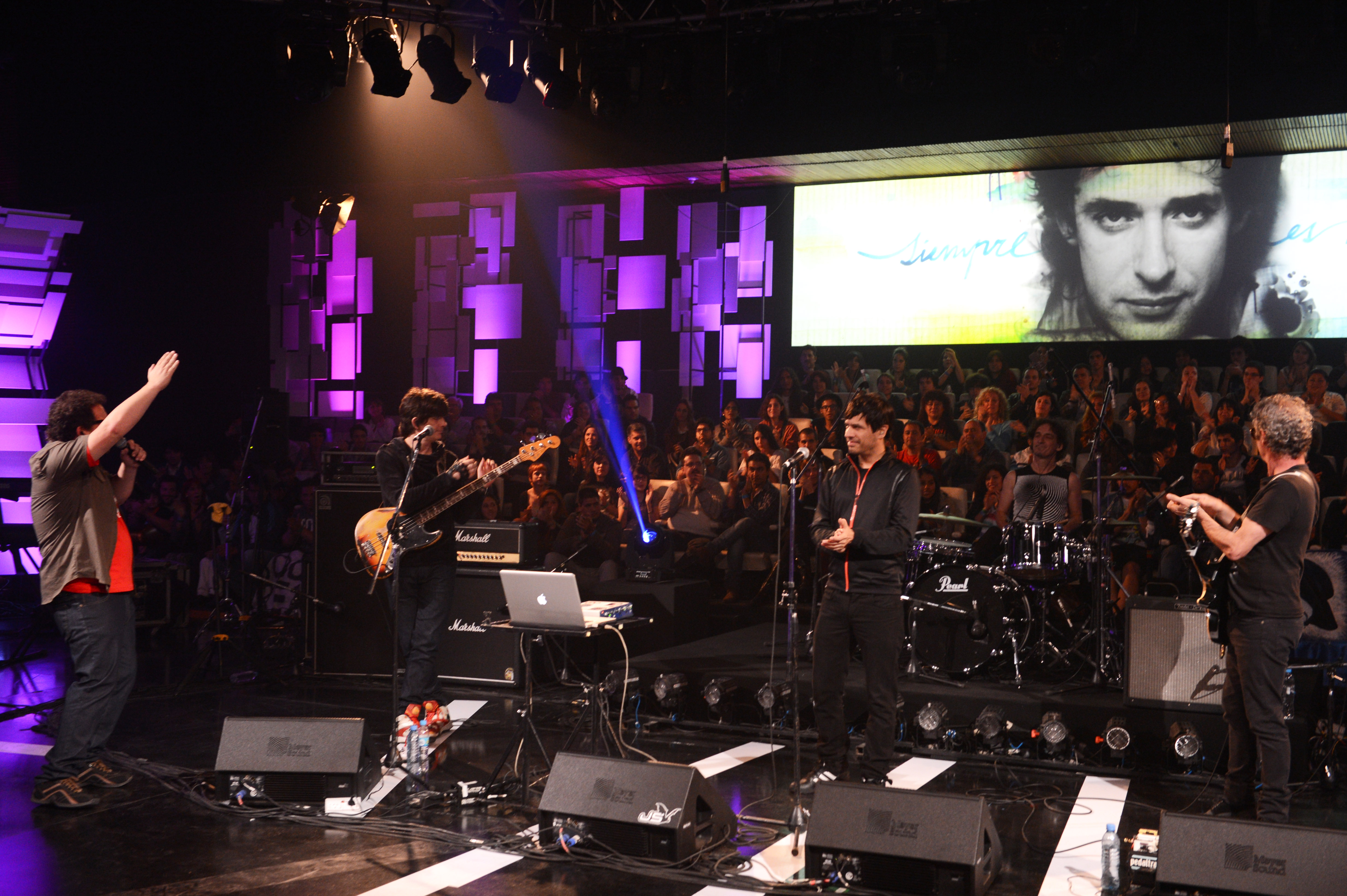 Leandro Fresco. Homenaje Gustavo Cerati. 04.11.2014. Foto TVP 2014